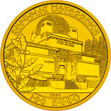 Монета Австрії